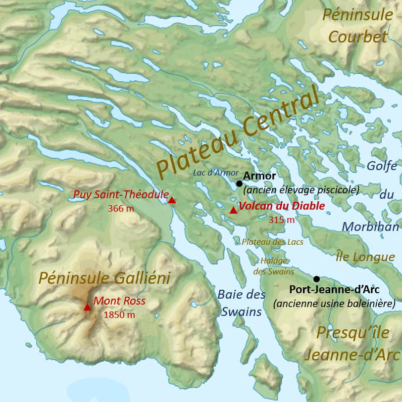 localisation du Volcan du Diable sur une extrait de la carte topographique de Kerguelen